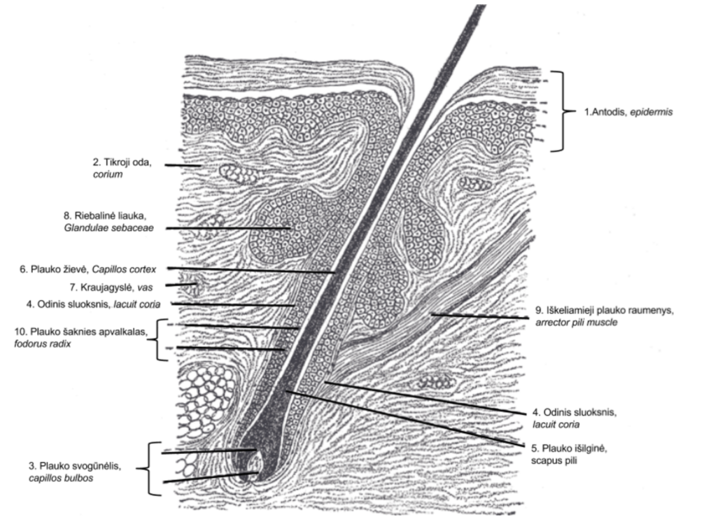 Plauko sistema